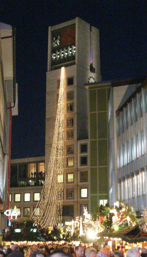 Stuttgart Rathaus